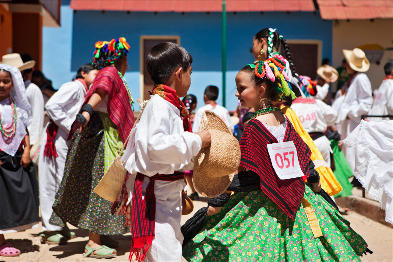 Concurso Nacional de Huapango en San Joaquín This photo has been taken in the country: Mexico